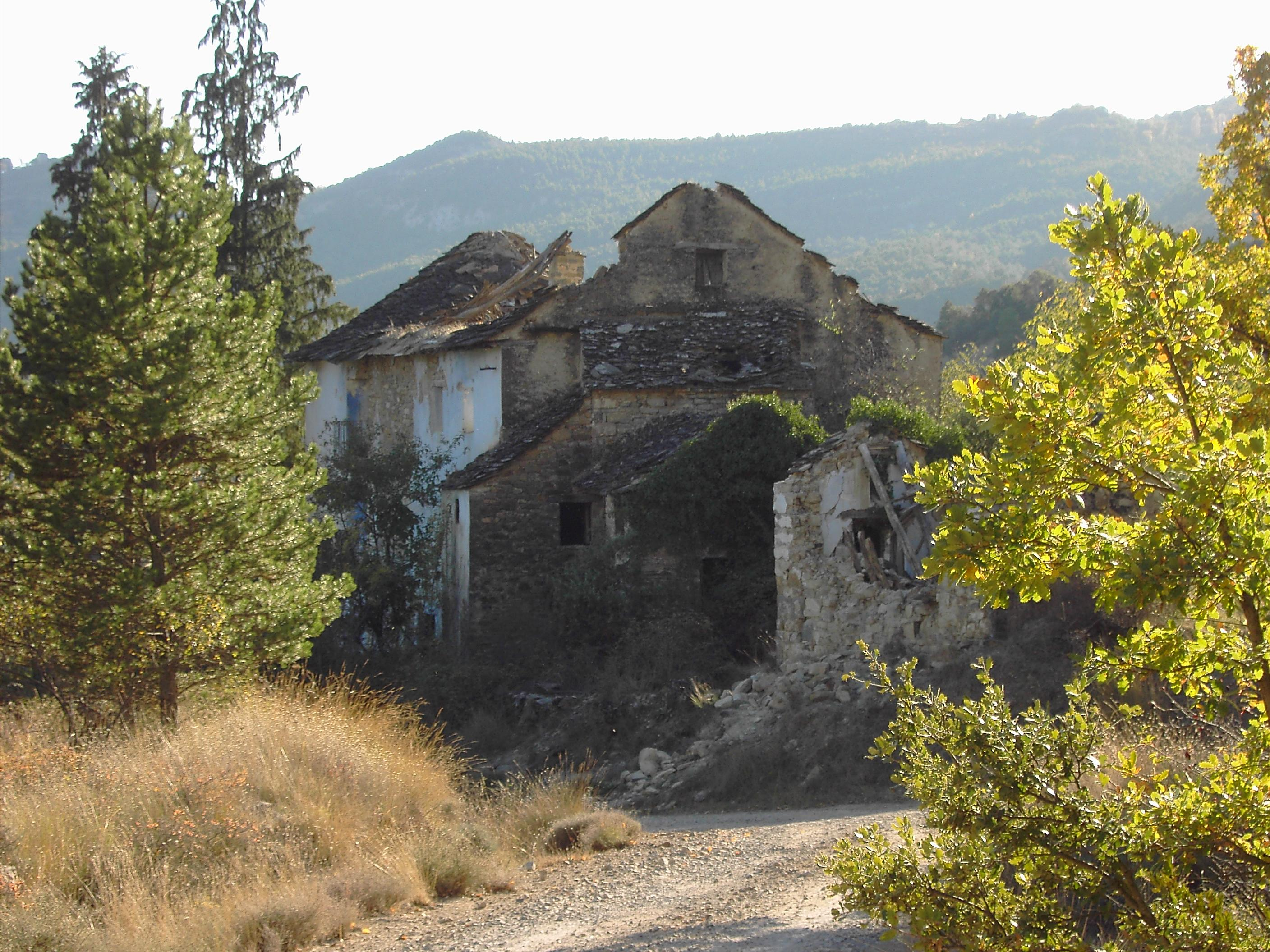 Las ruinas de la vivienda de Santa María de Ascaso, abandonadas desde hace décadas.